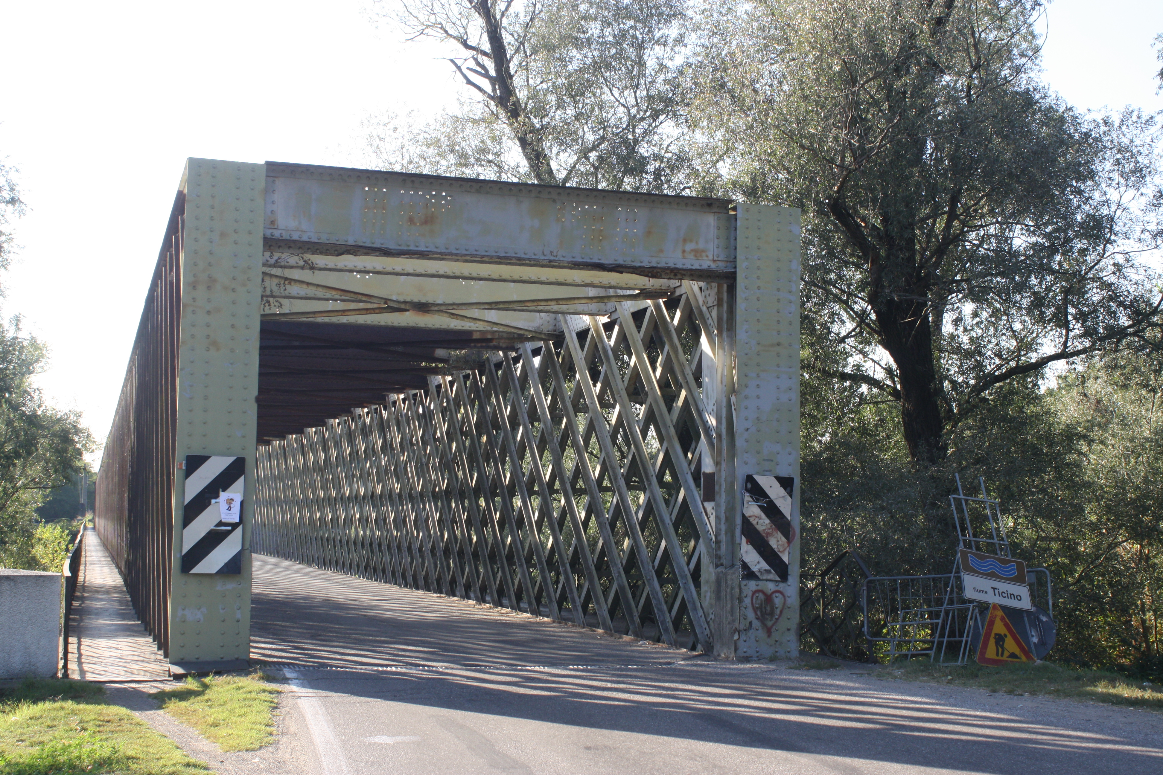 Il ponte di Oleggio sul fiume Ticino ripreso dal lato lombardo, a Lonate Pozzolo.